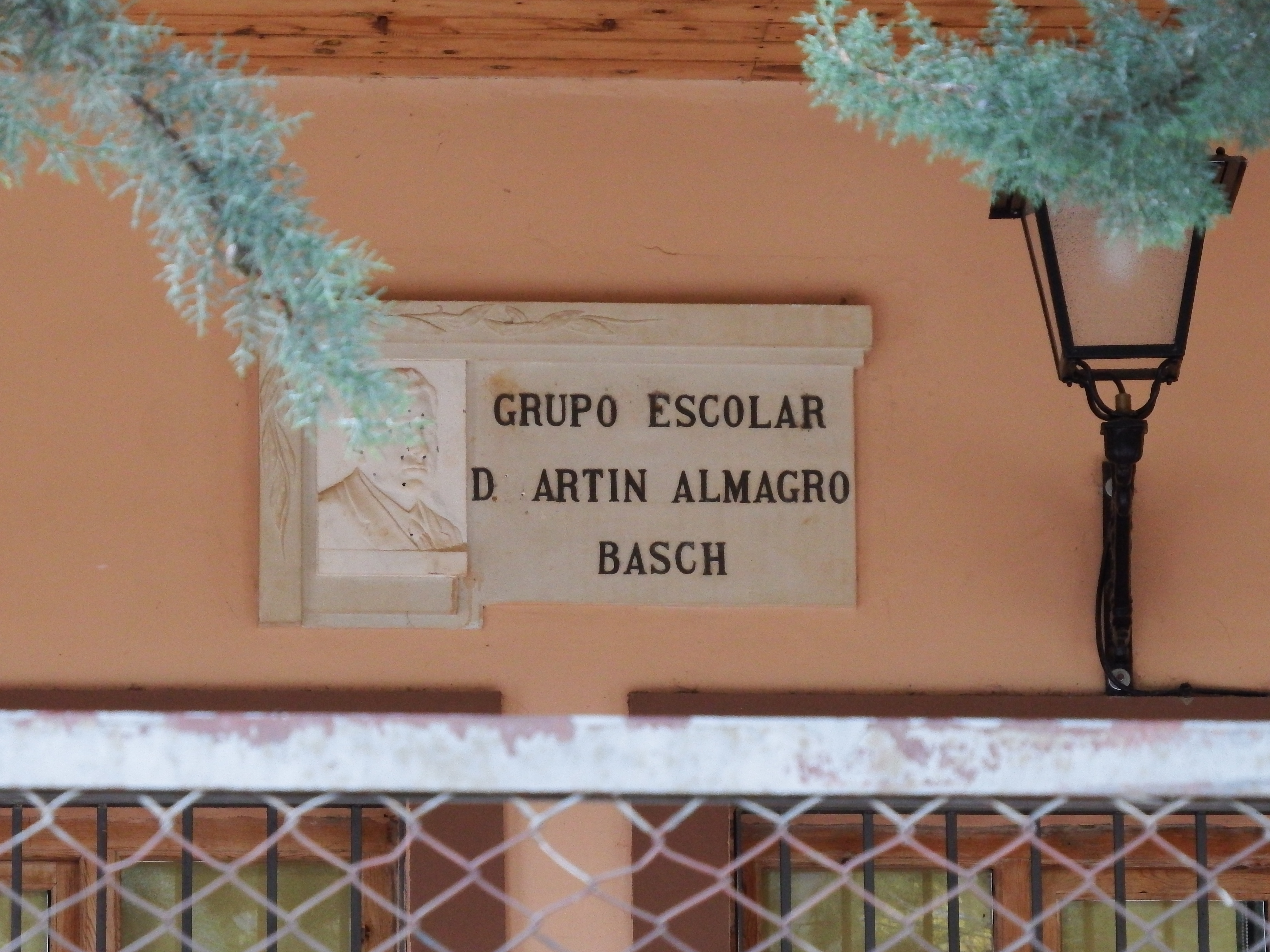 Sede central del CRA Sierra de Albarracín en Tramacastilla, dedicado al arqueólogo y prehistoriador Martín Almagro Basch.